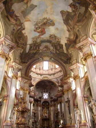 Intérieur de l'église Saint Nicolas de Mala Strana, à Prague en République Tchèque. Auteur : Micro